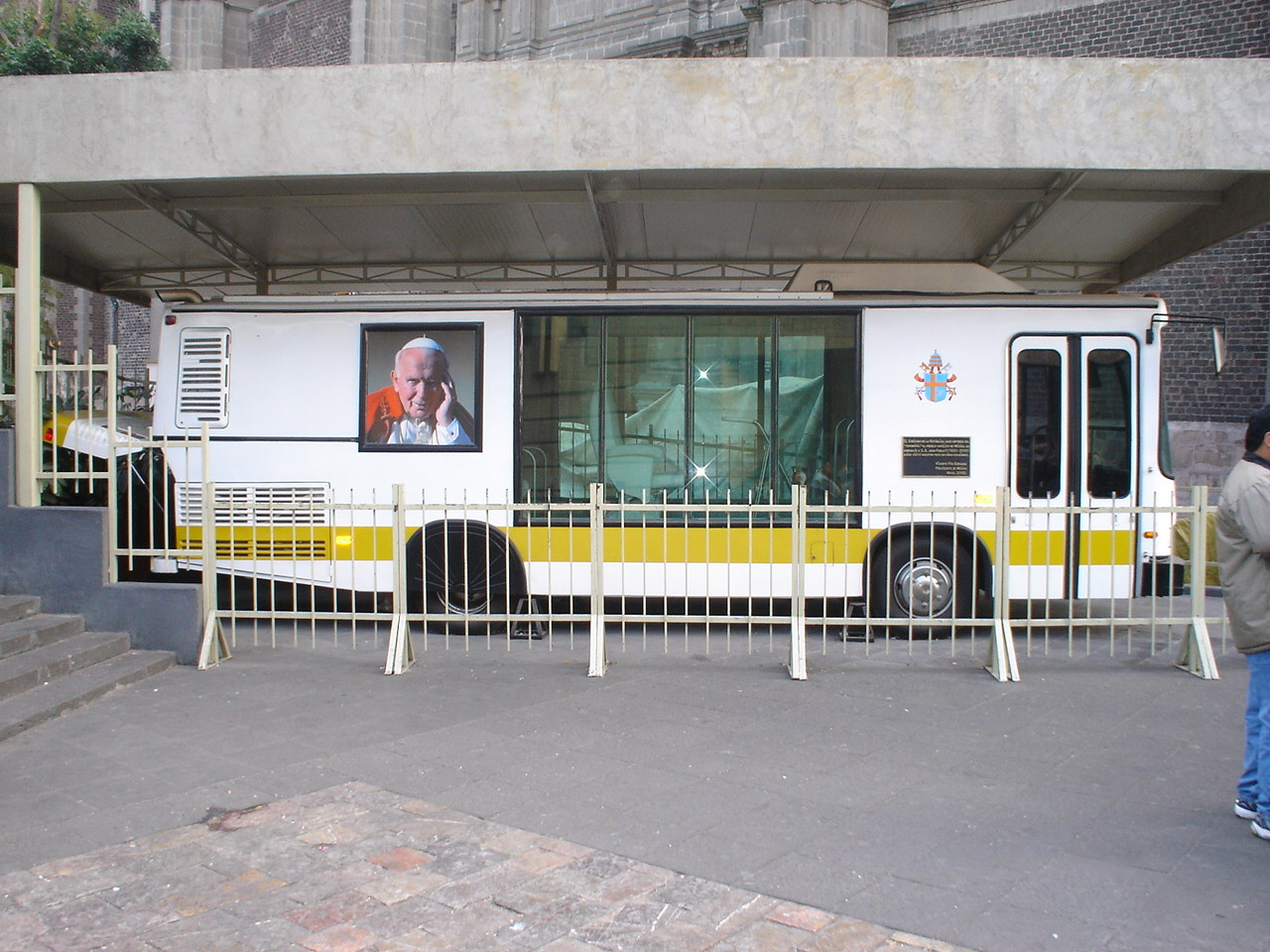 PAPAMOVIL EN MEXICO